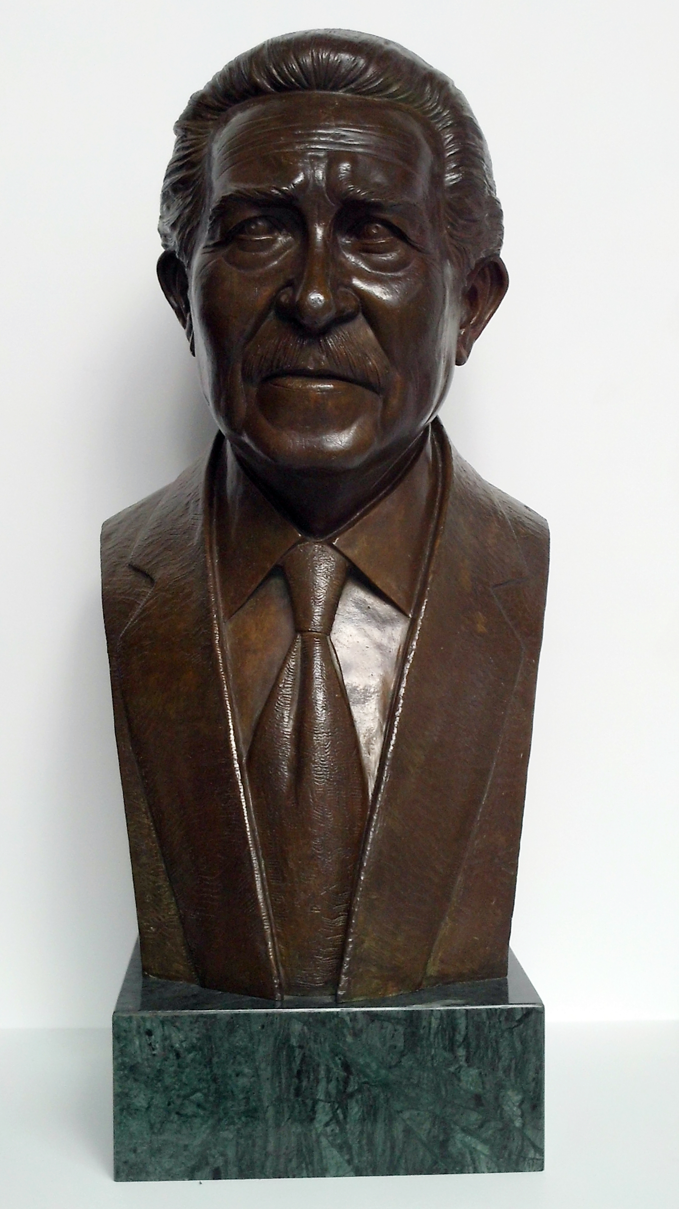 Mariano Bellver Utrera. Sebastián Santos Calero. 2009. Colección Bellver. Casa Fabiola. Sevilla, Andalucía, España.